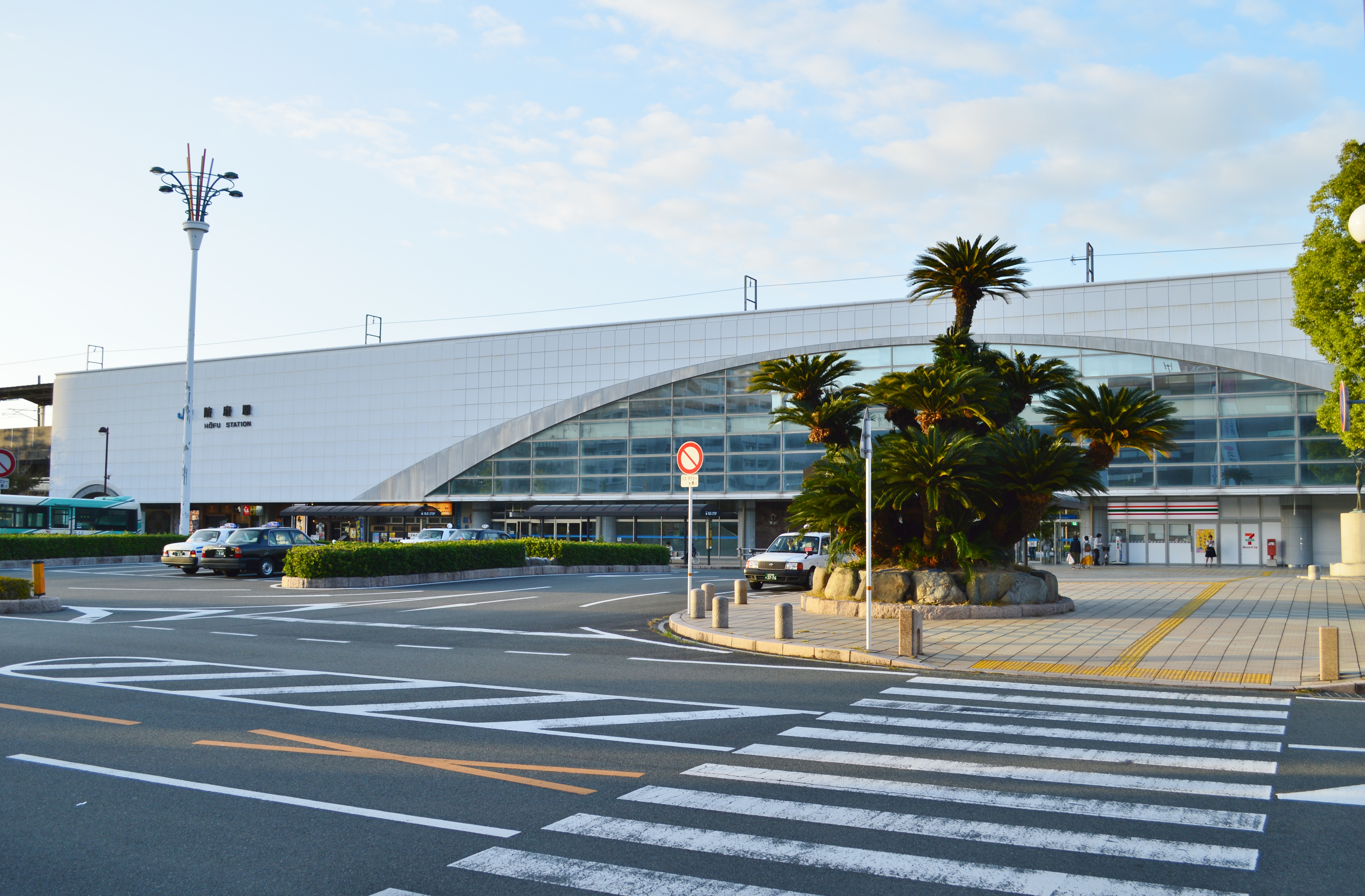 防府駅 みなとぐち